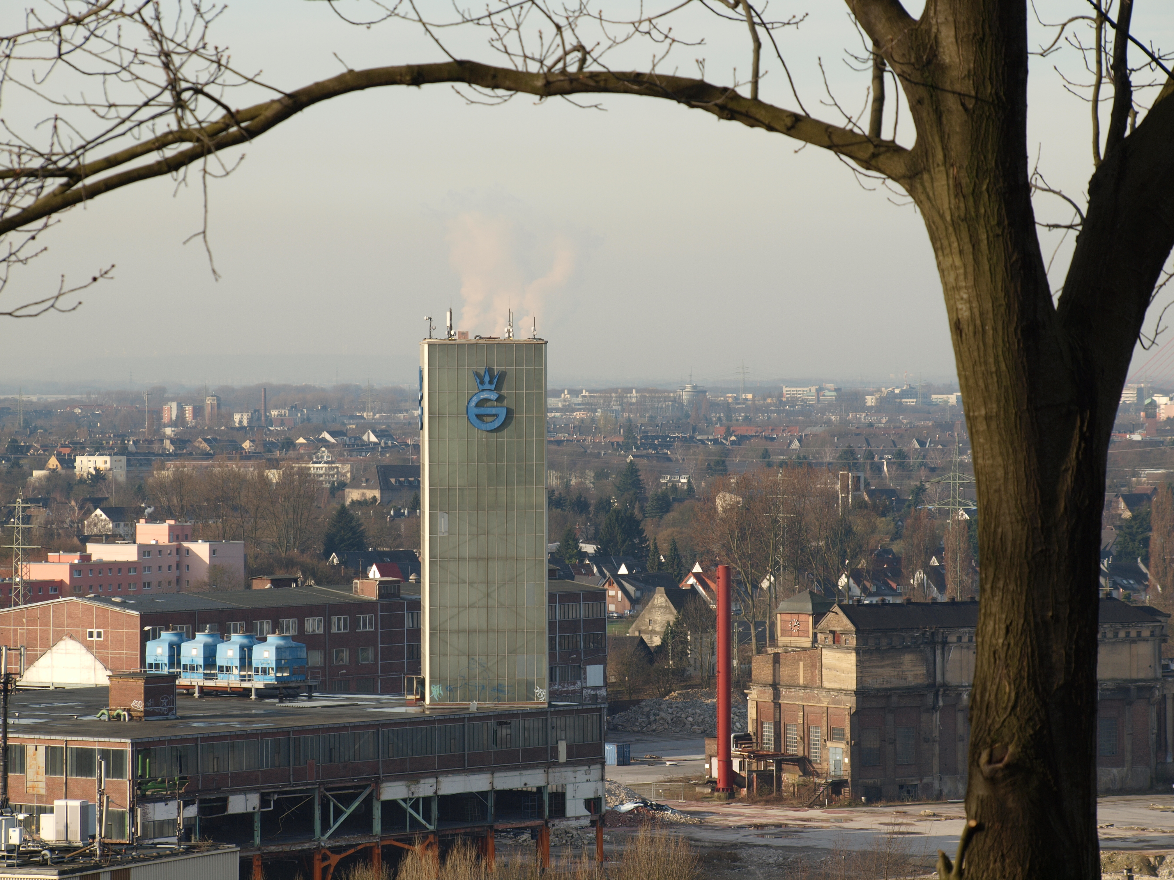 Blick auf das Gelände der Gerresheim Glas